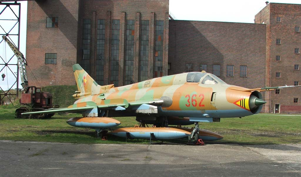 Su-22 Fitter - Peenemünde Museum - 2007